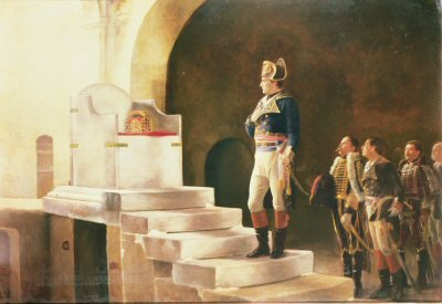 Napoleon in Aachen